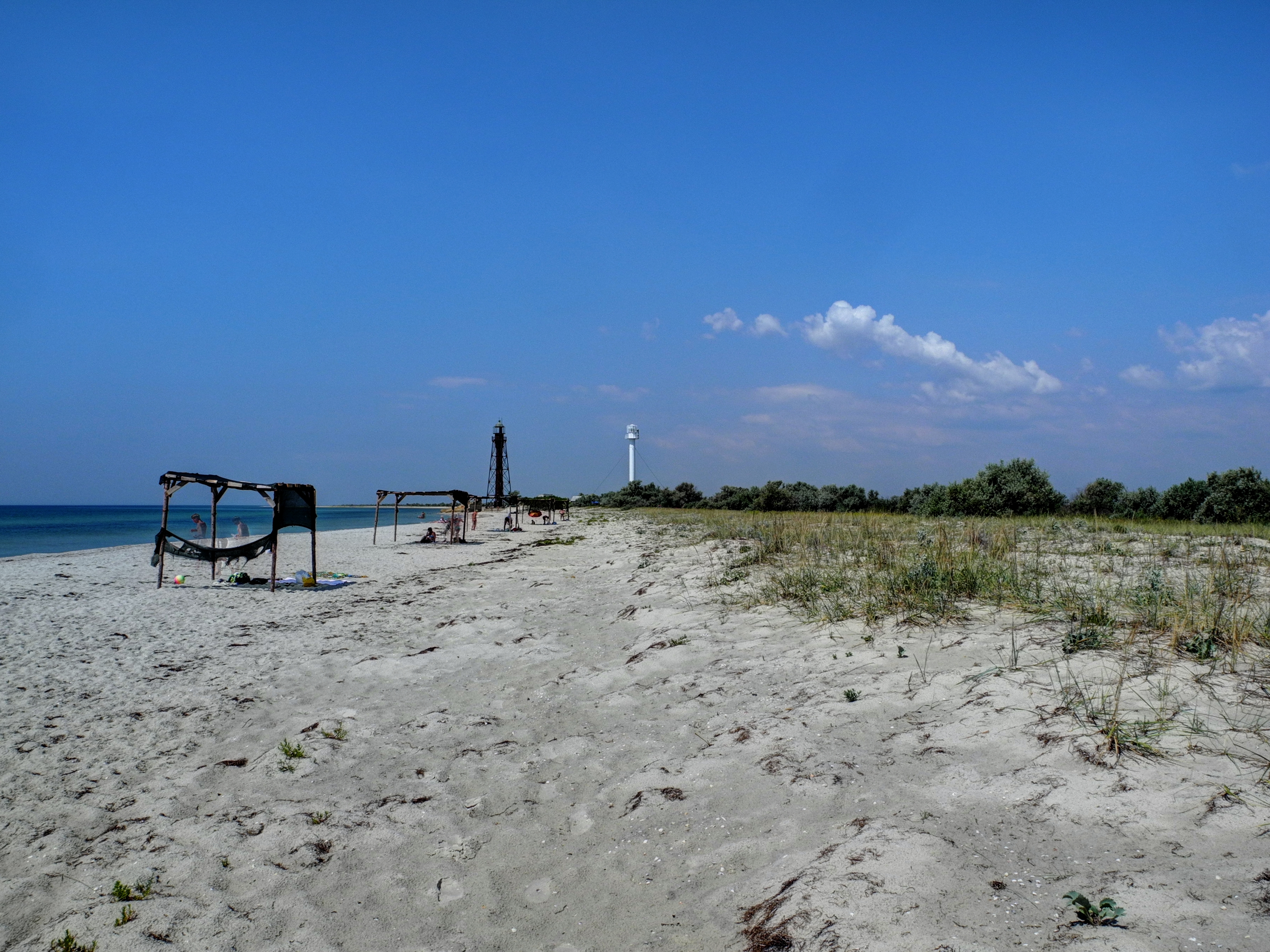 о. Джарылгач "Маяк"